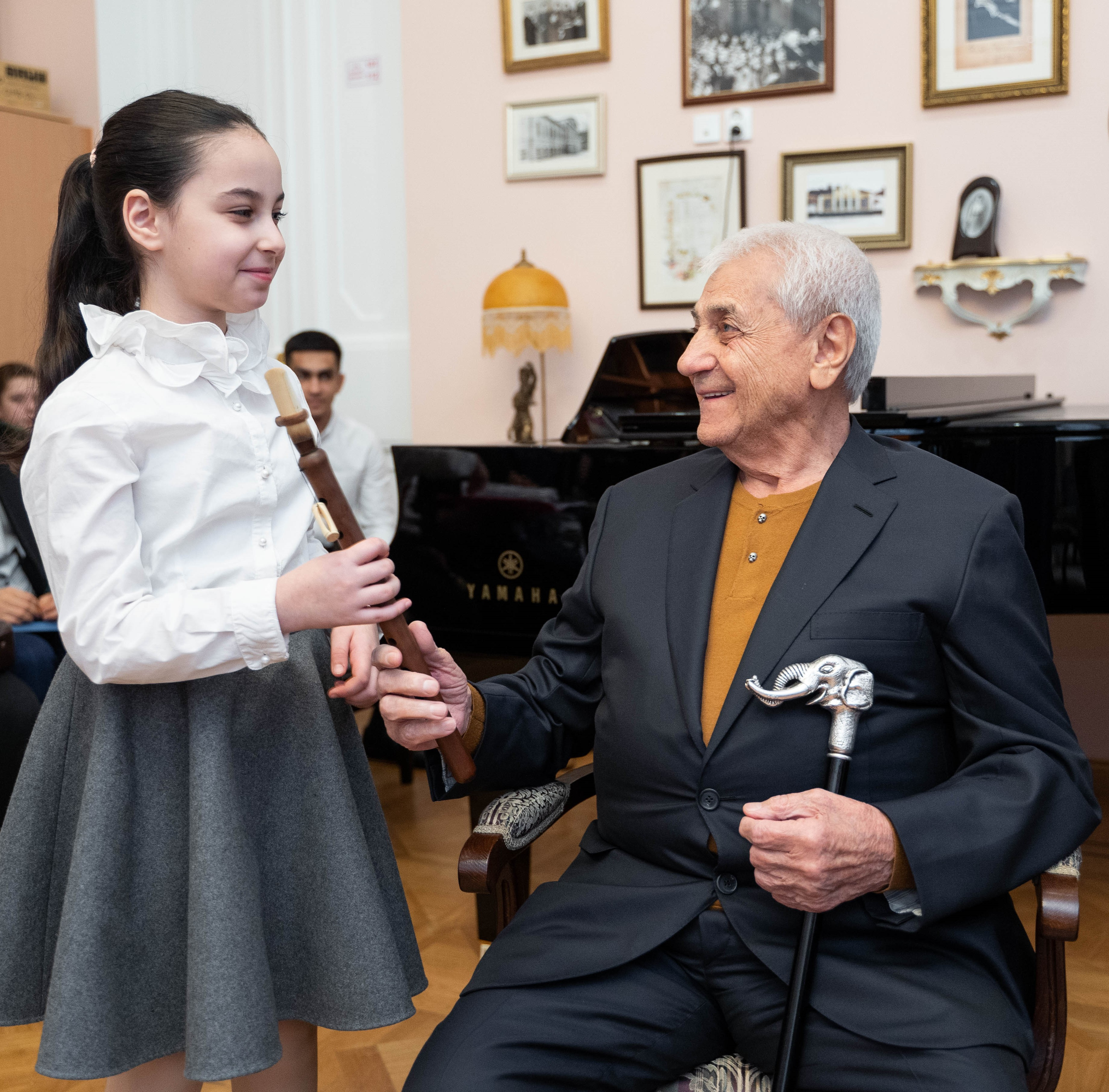 Ջիվան Գասպարյան ավագի և Գասպարյան կրտսերի մասնակցությամբ առաջին վարպետության դասը Գնեսինների անվան դպրոցում գործող դուդուկի դասարանում